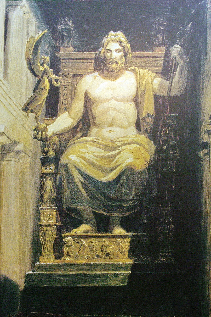 Abbildung der Zeus-Statue des Phidias